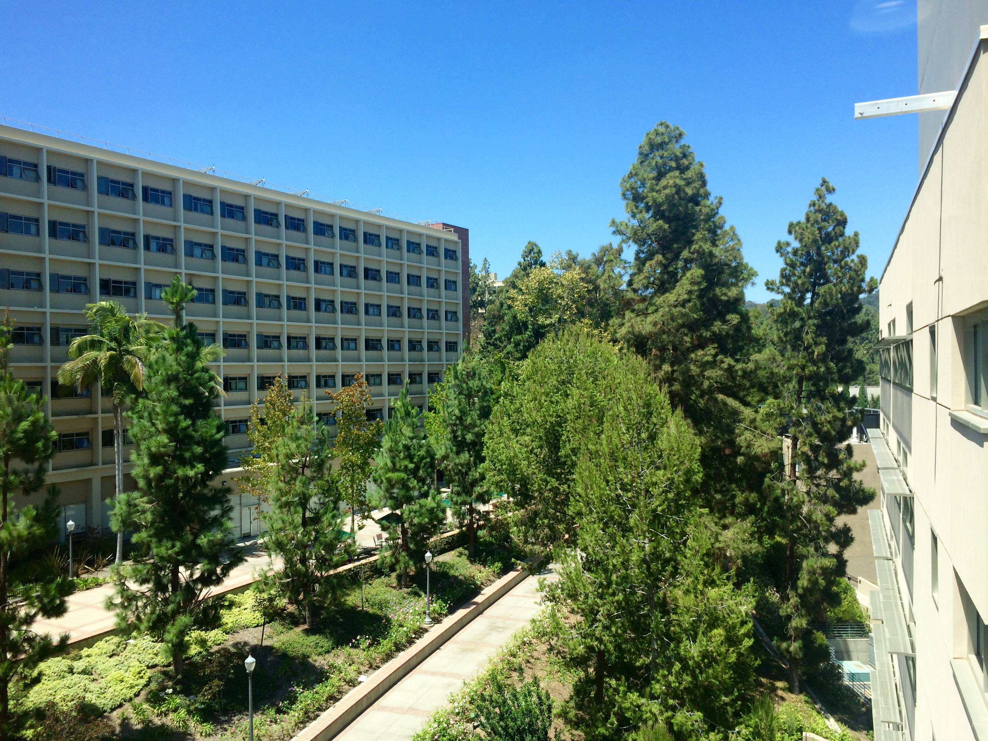 UCLA dorm